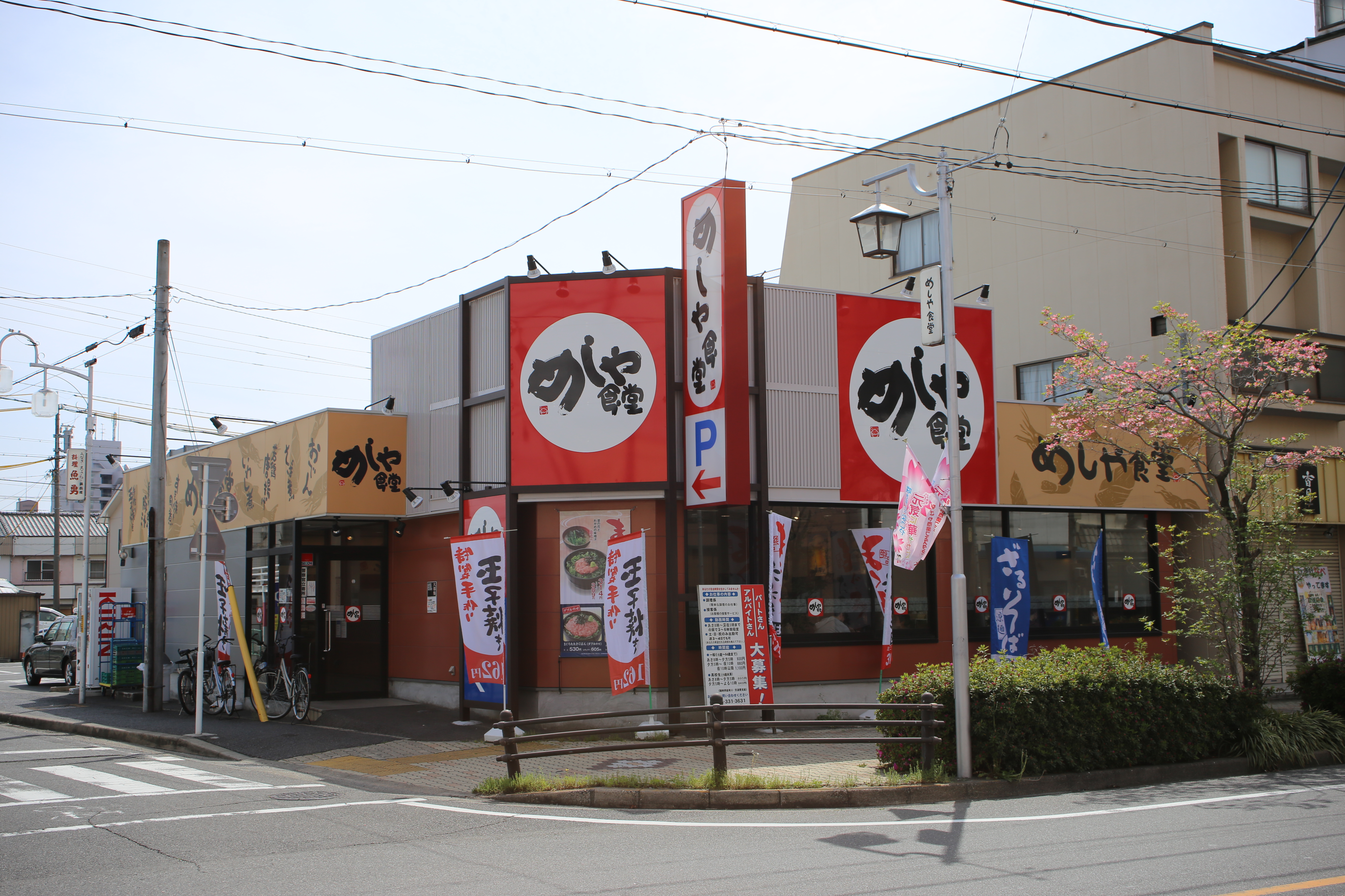 名古屋市中川区尾頭橋にあるめしや食堂尾頭橋店